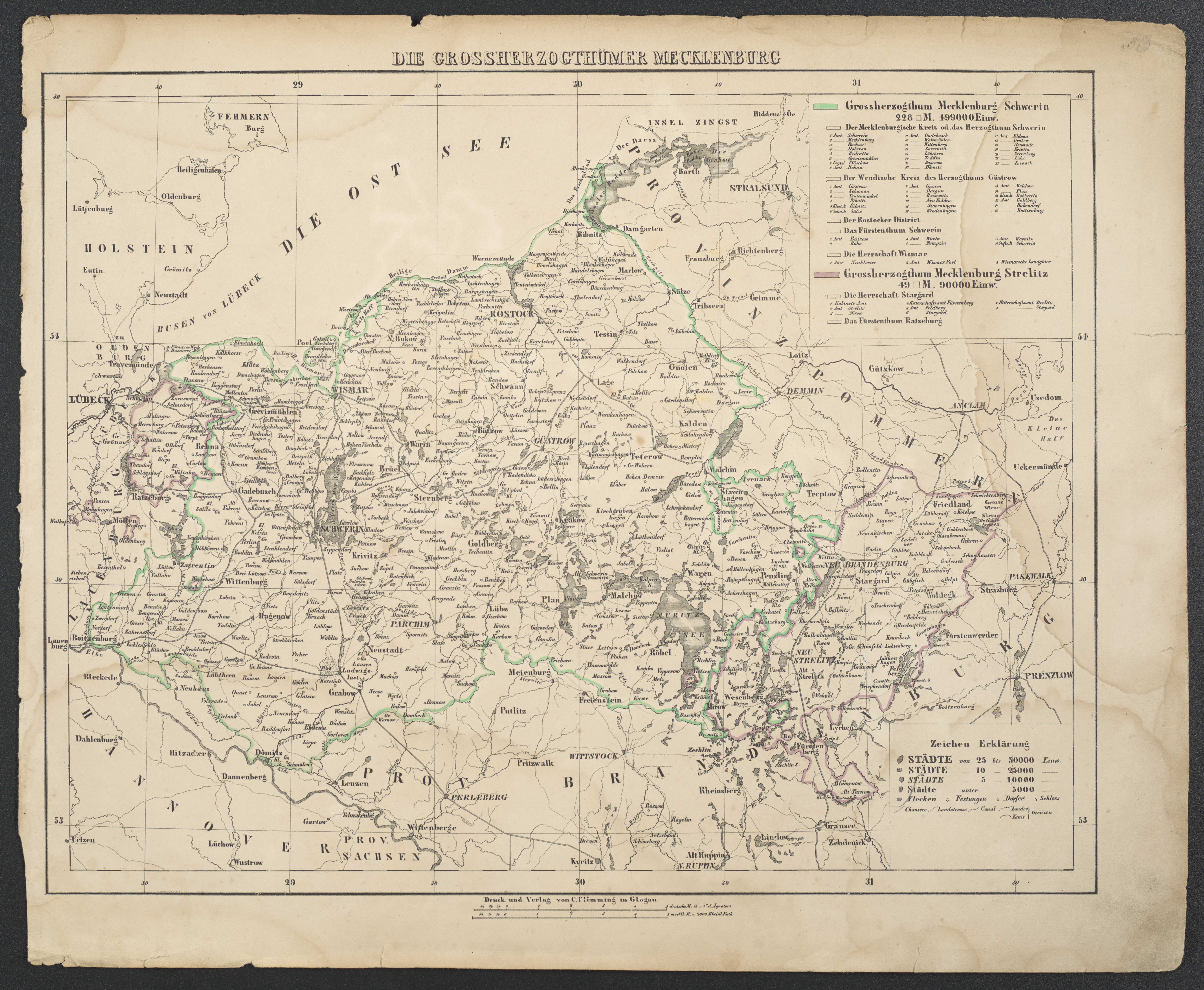 1 Kt. : Grenzen kolor. (39 x 30 cm); Koordinaten E 10°31'00"-E 14°05'00"/N 54°31'00"-N 52°54'00" ; In: Vollständiger Hand-Atlas der neueren Erdbeschreibung ueber alle Theile der Erde / herausgegeben von K. Sohr. - Maßstab in graph. Form (deutsche M., mecklb. M.). - Titel oberhalb des Kt.-Feldes. - Maßstab unterhalb des Kt.-Feldes. - Legende oben rechts. - Erkl. der Zeichen unten rechts. - Ohne Relief